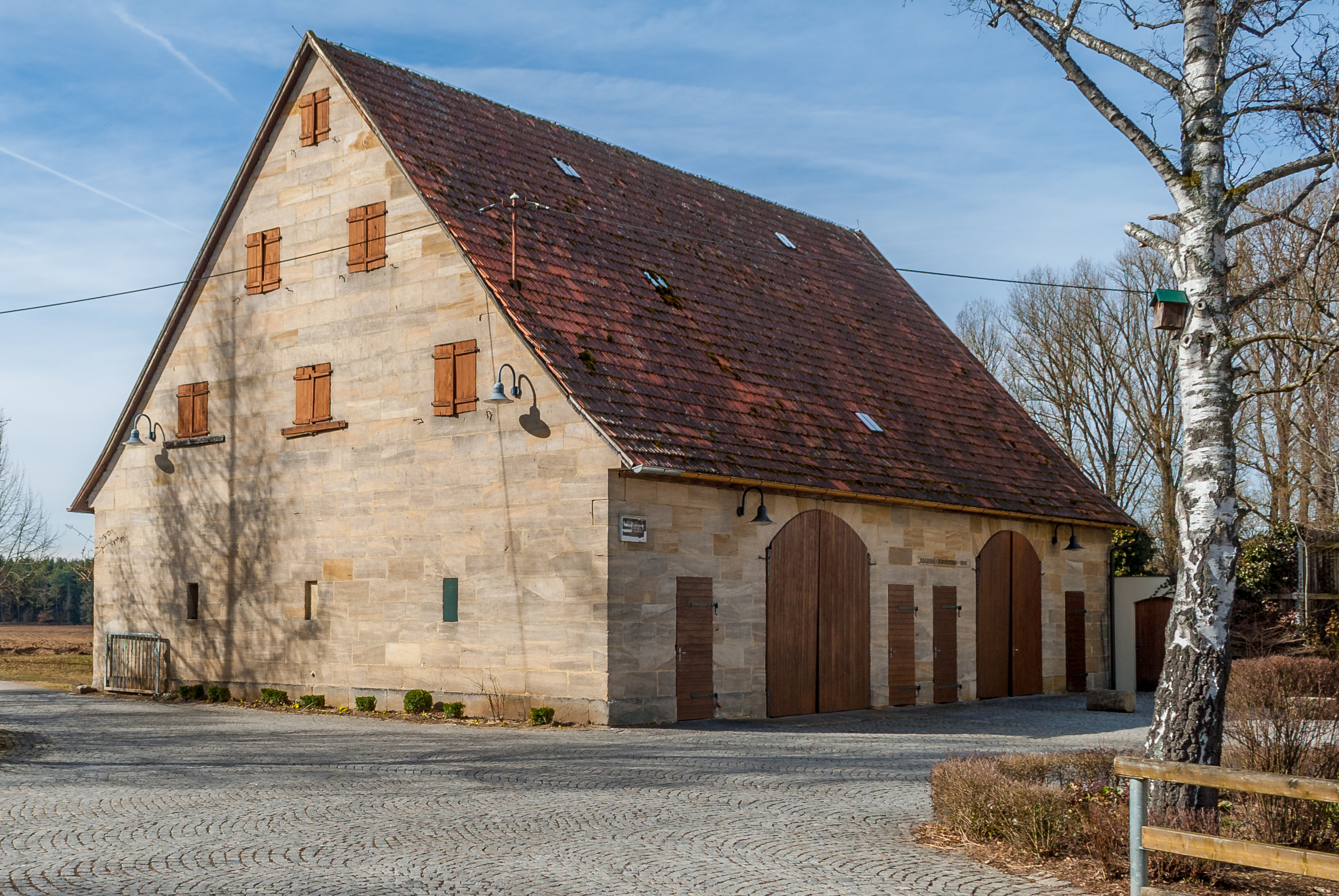 Minderleinsmühle bei Kalchreuth, Scheune This is a photograph of an architectural monument.